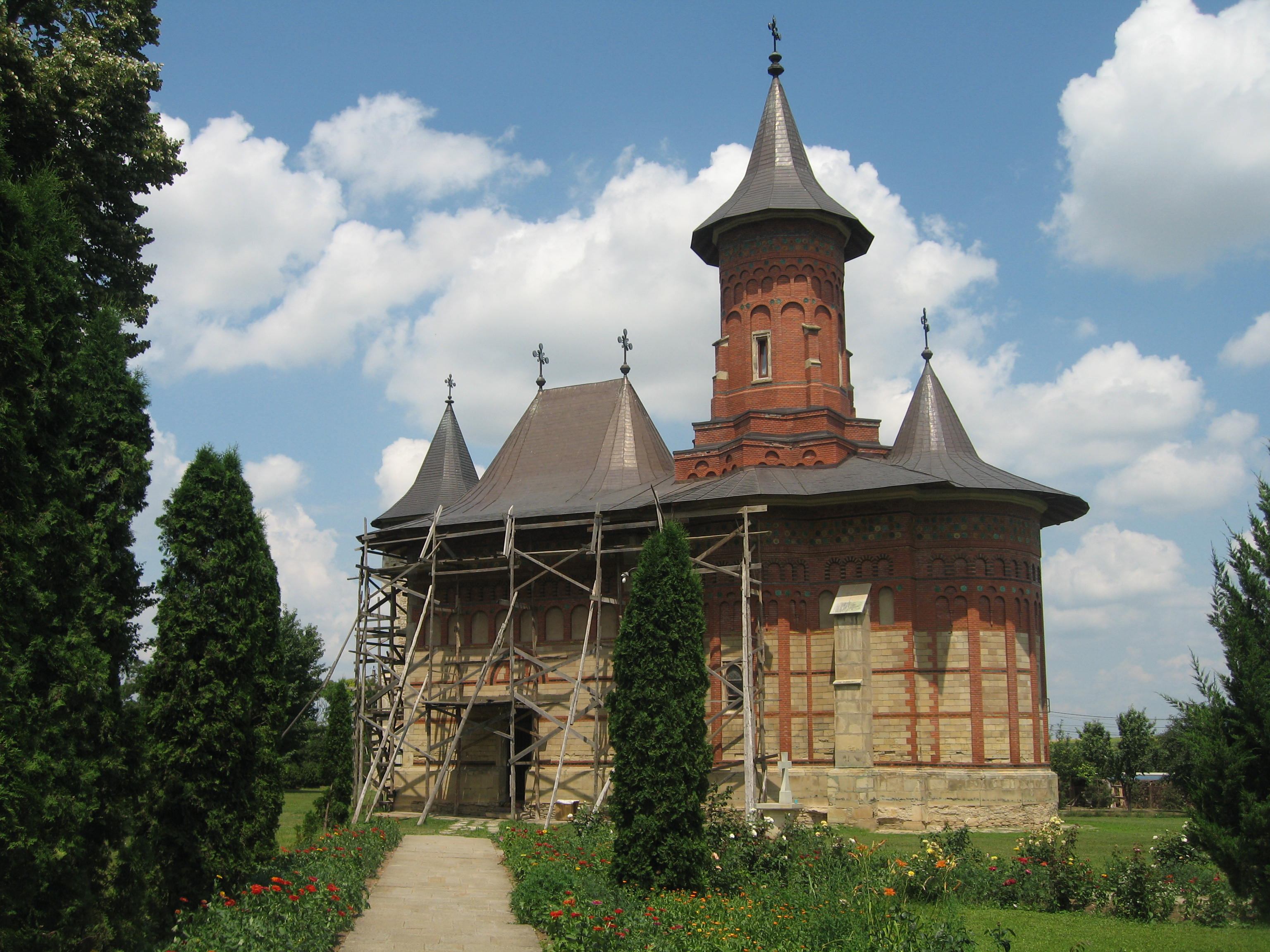 Mănăstirea Popăuţi